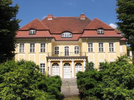 "Villa Schönblick", auch genannt Schloss Schönhagen in Schönhagen, Gemeinde Trebbin (im Naturpark Nuthe-Nieplitz), Landkreis Teltow-Fläming, Land Brandenburg erbaut 1902 / 1910 für Emil Mosse; unter Denkmalschutz Hinweis für Interessenten: Das Haus steht tief in einem Waldpark und ist auf den ersten Blick unzugänglich. Es liegt an der Straße von Stangenhagen nach Schönhagen kurz vor Schönhagen auf der rechten Seite. Kurz nach der letzten Kurve kommt am Wald eine verschlosssene Toreinfahrt. Geht man jedoch einige Hundert Meter zurück Richtung Stangenhagen, findet man einen Weg zwischen Wald und Feld (ungefähr gegenüber den Einzelhäusern, die auf der Seeseite liegen). Hier kann man in rund 15 Minuten um den Wald herum das Haus erreichen - und von dieser Seite ist das Schloss und das gesamte Gartengelände verblüffenderweise völlig offen. Und völlig einsam; zwar wunderbar restauriert, aber offenbar zur Zeit (2004) nicht genutzt.